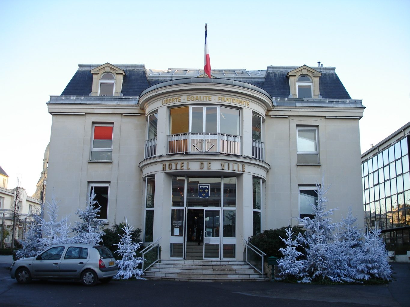 L'hôtel-de-ville - Enghien-les-Bains (France)